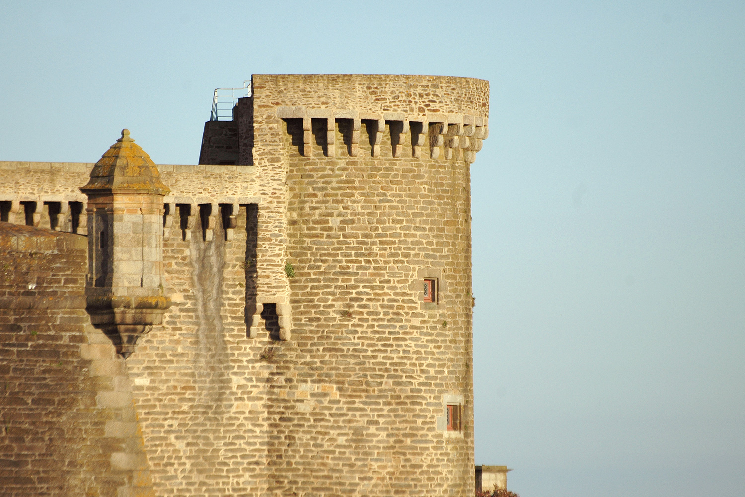 Chateau de Brest - Tour Azenor